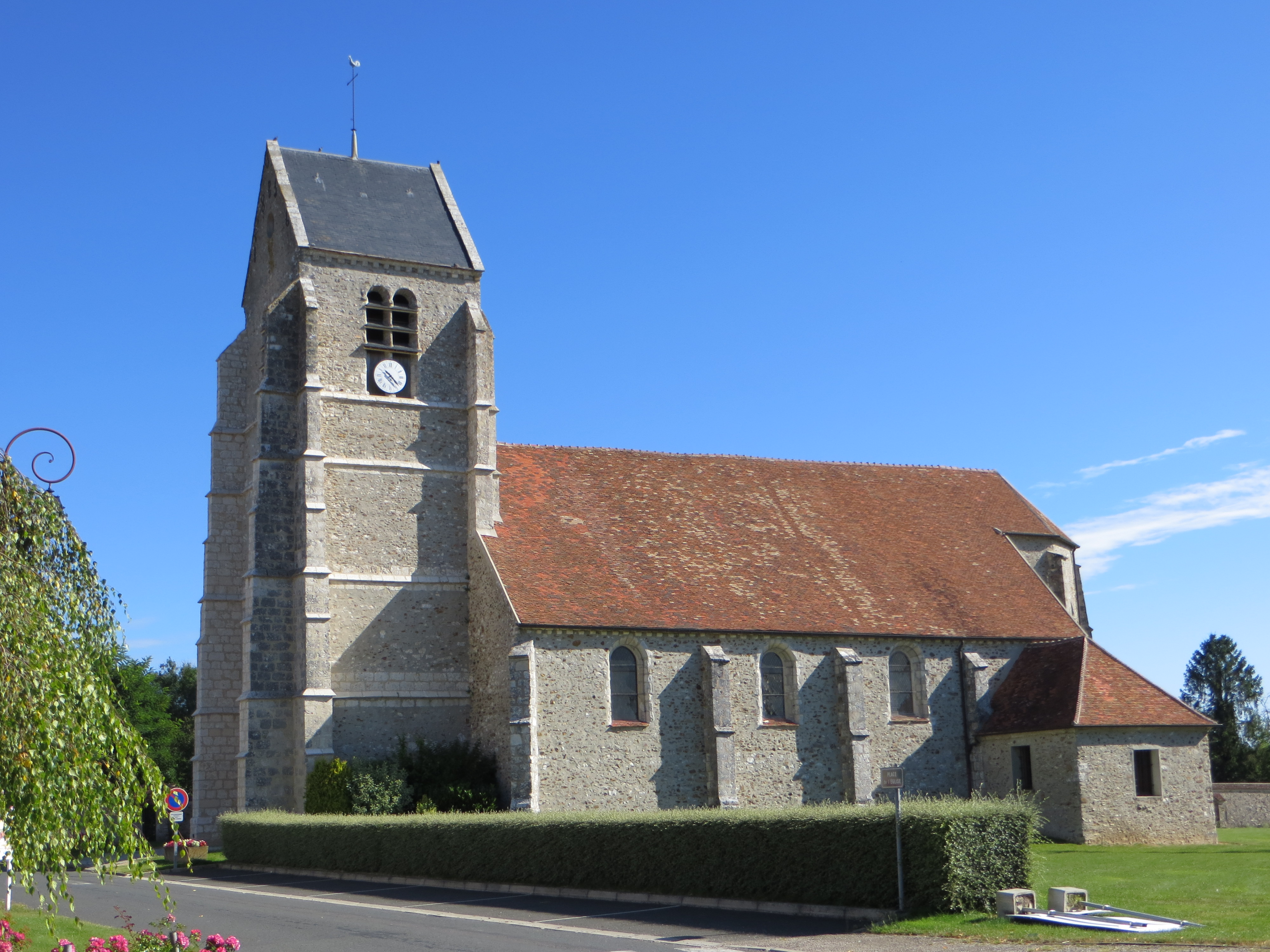 Vue générale de l'église